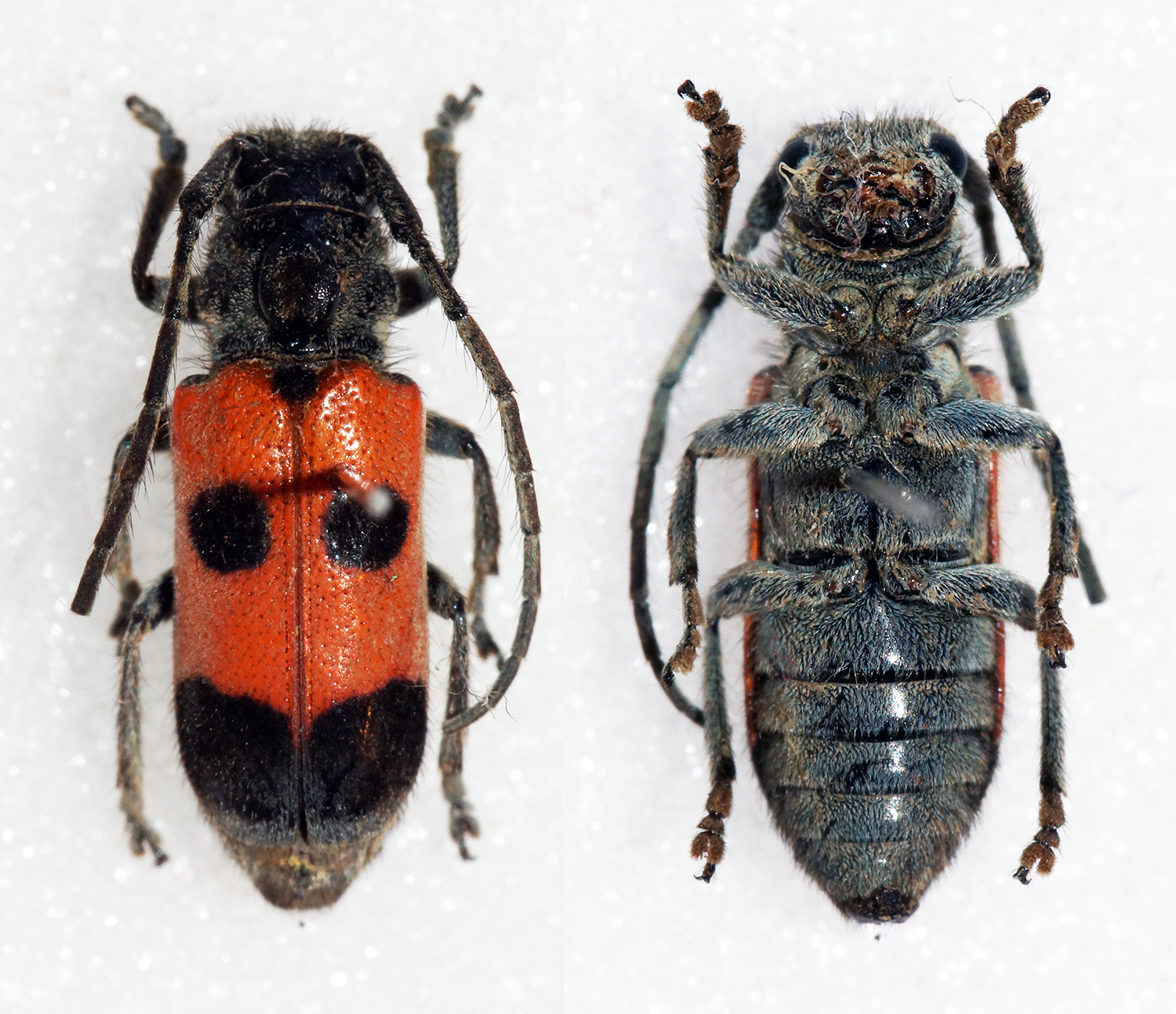 Chemsak, 1963 Sex: ? Data: 08-2014 - Pico Pijol - Atlantida - Honduras Size: 11mm